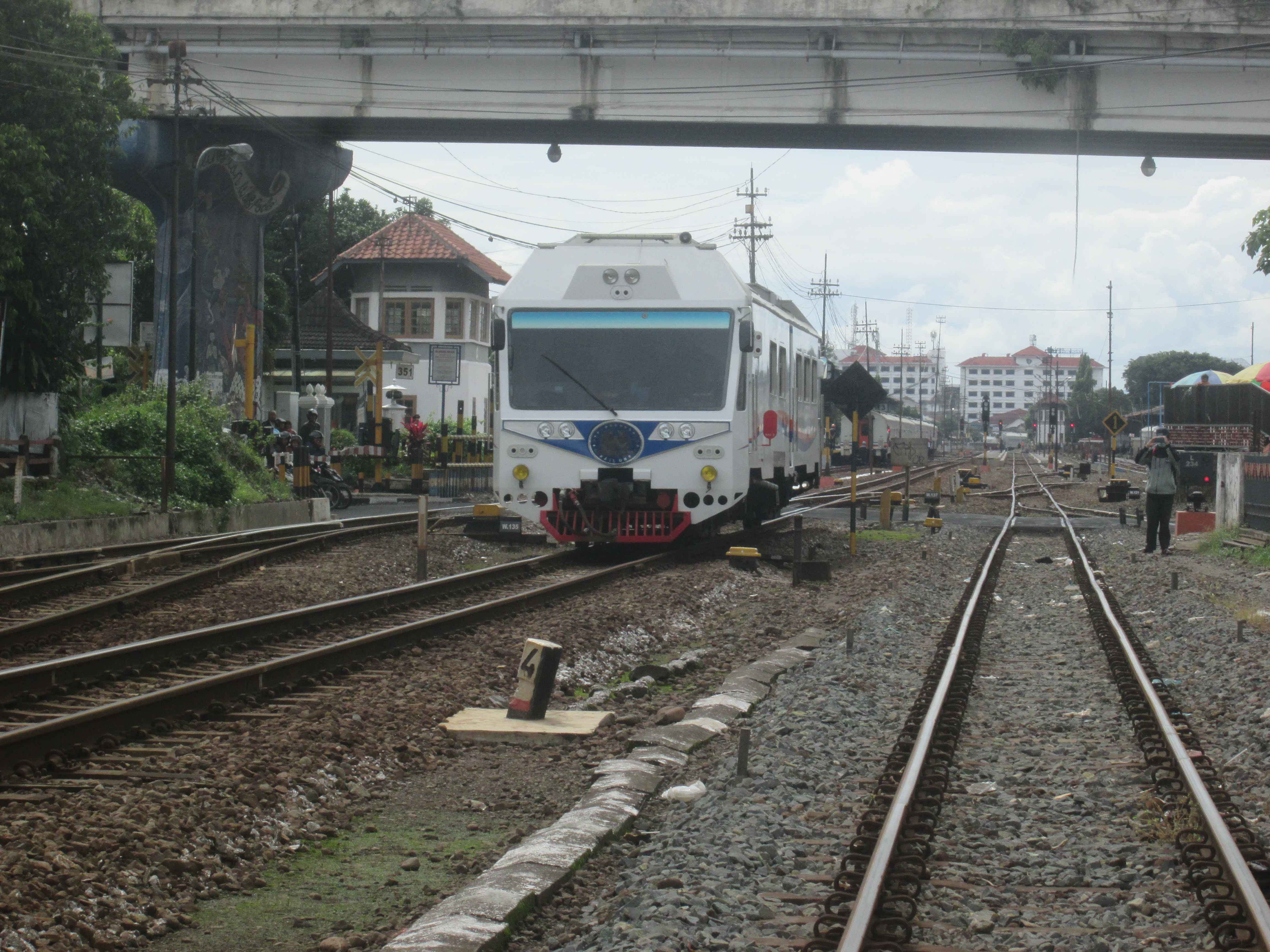 Kereta inspeksi RailOne memasuki stasiun Lempuyangan.